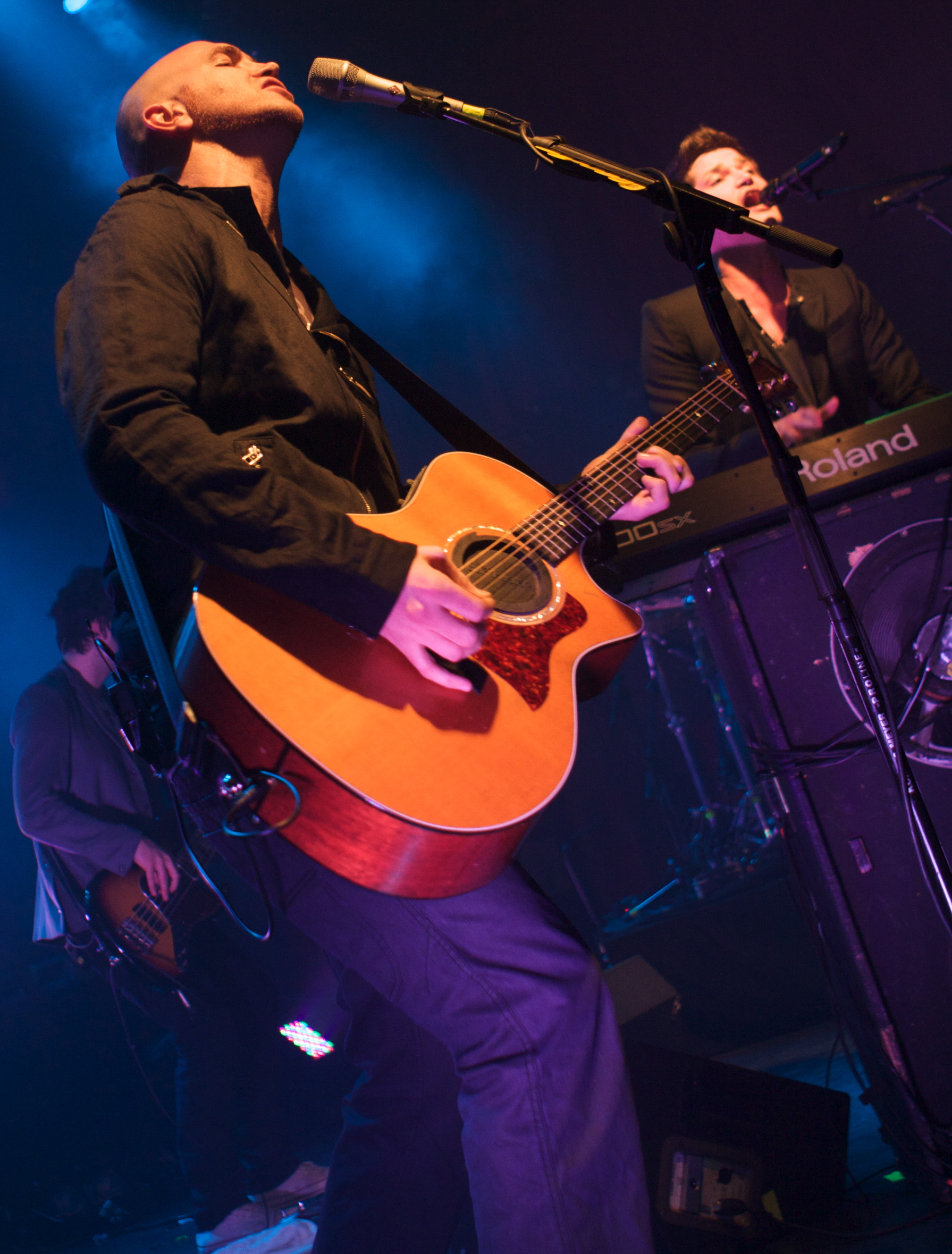 The Script en la Sala Apolo de Barcelona el 2 de Marzo de 2009.